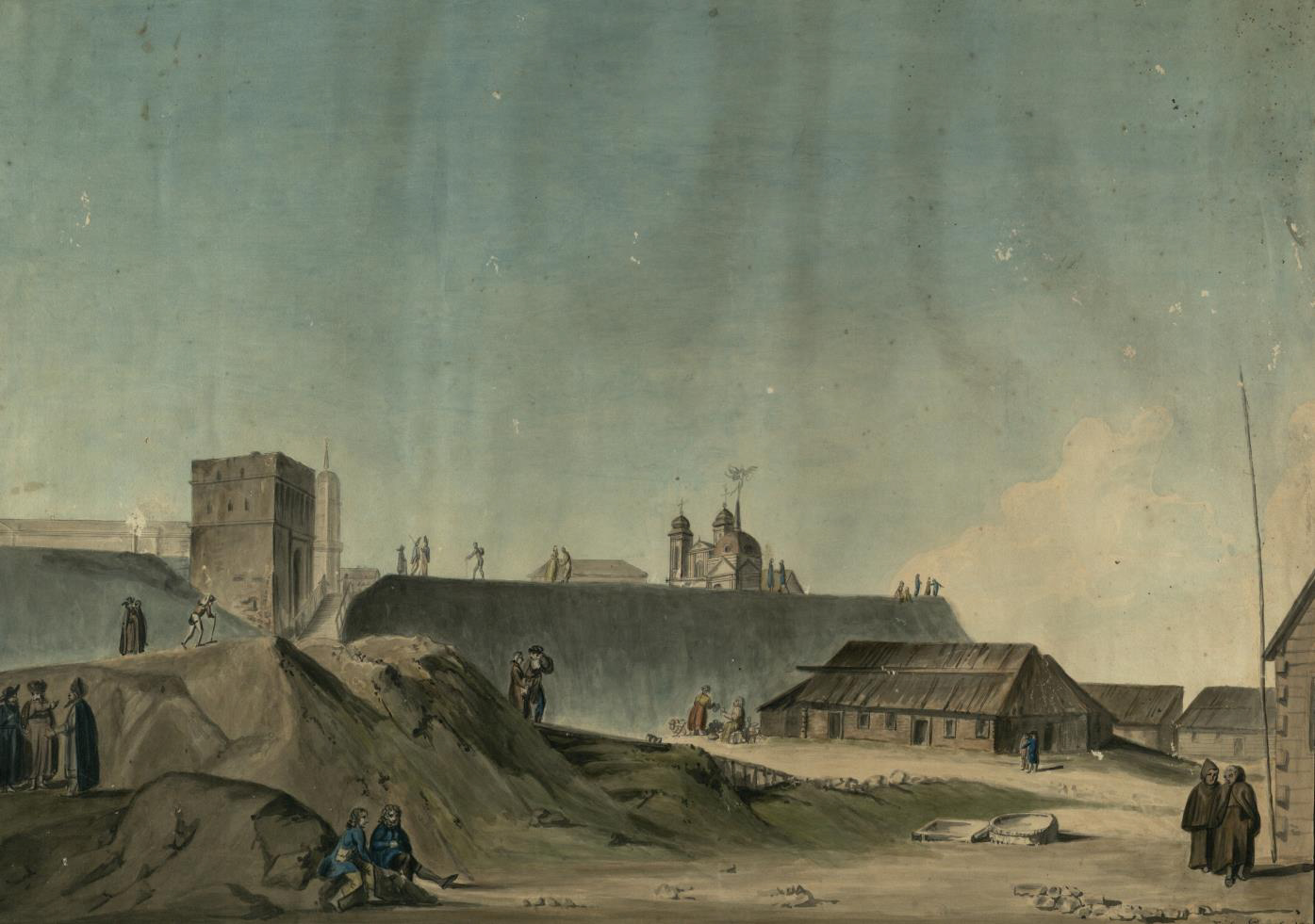 Беларуская (тарашкевіца): Магілёў (Mahiloŭ), Алейная брама (Alejnaja brama)